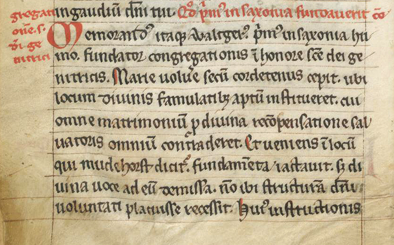 Handschrift Wigand: Vita sancti Waltgeri (Auszug). Bezug: Klosterruine Müdehorst Bielefeld